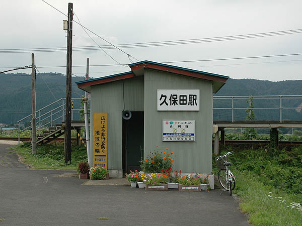 Kubota Station, on Yuri Kōgen Railway, Yurihonjō, Akita, Japan